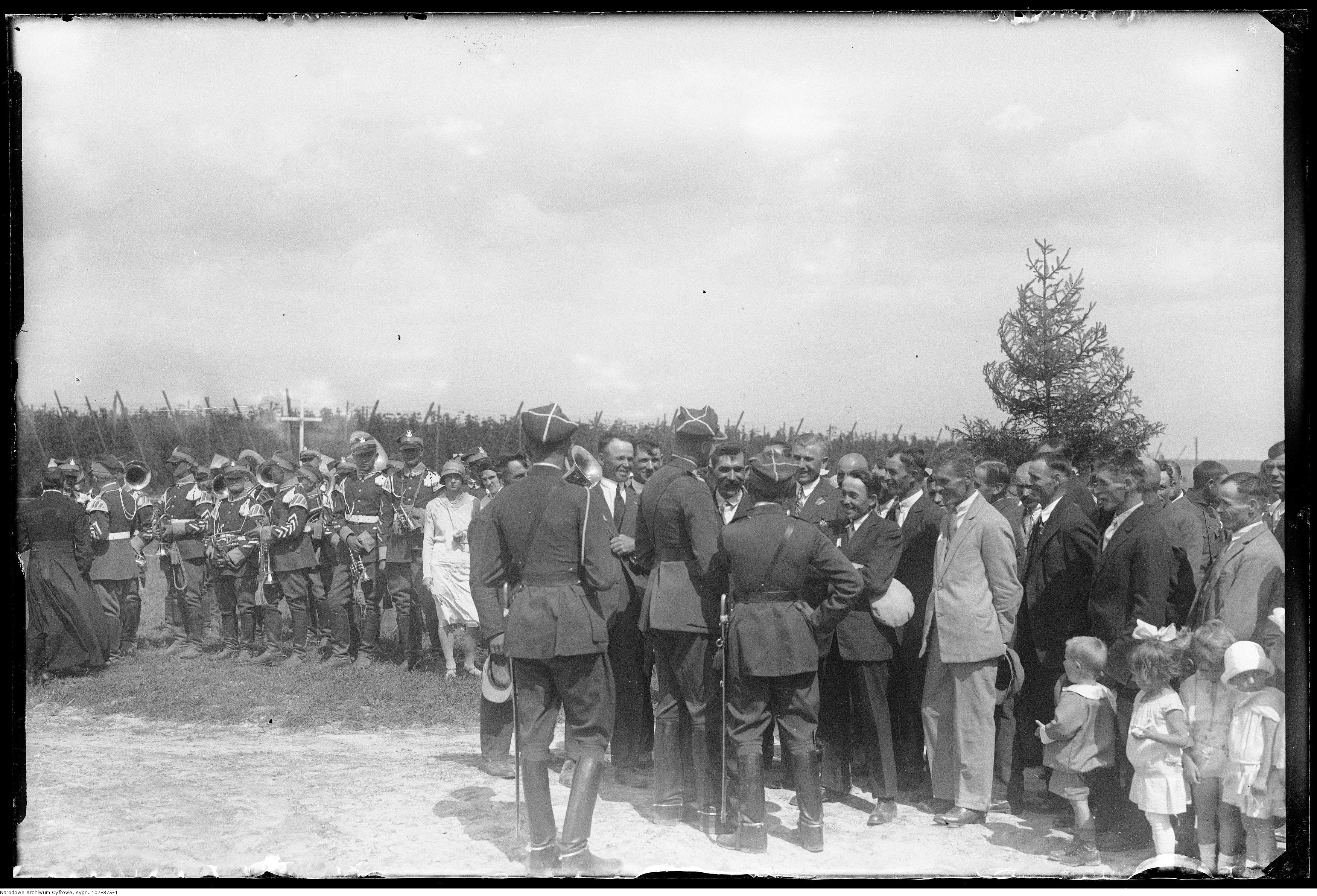 Dowódca pułku między osadnikami.